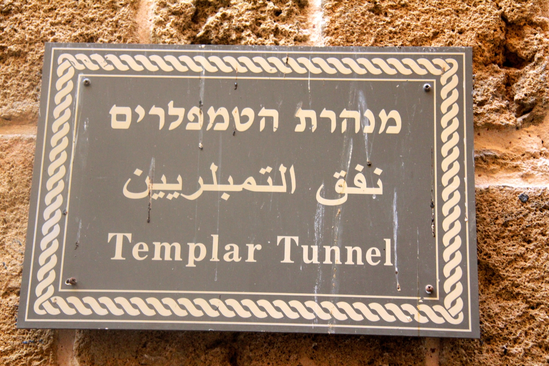 Israele archeologico-religioso *Akko o Acri * Acre (city)